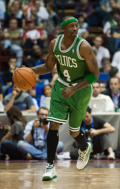 NBA Europe Live Tour 2012 - Milano